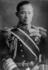 Japanese admiral Teruhisa Komatsu (1888-1970)